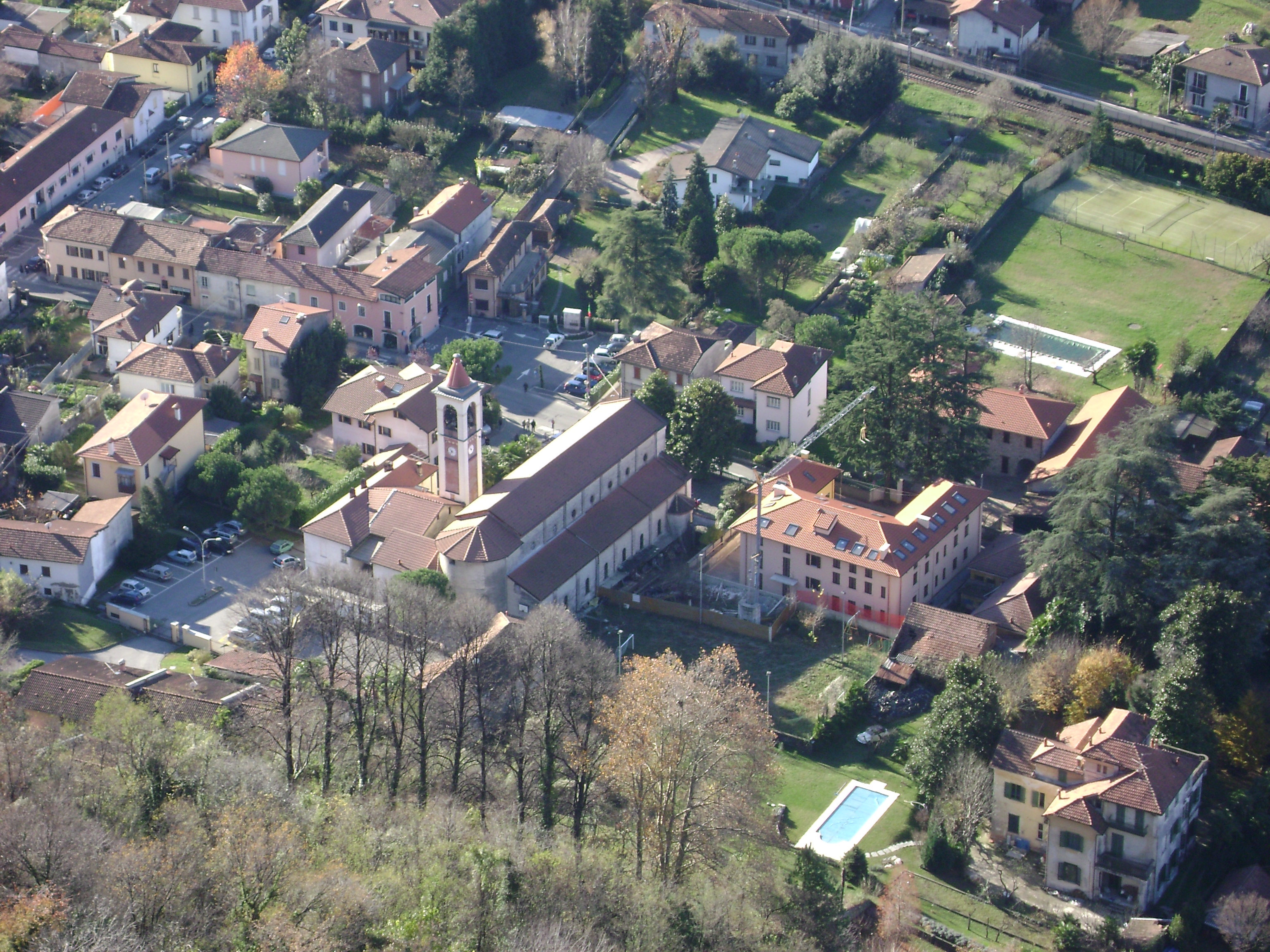 Il centro di Sangiano visto dal monte Picuz